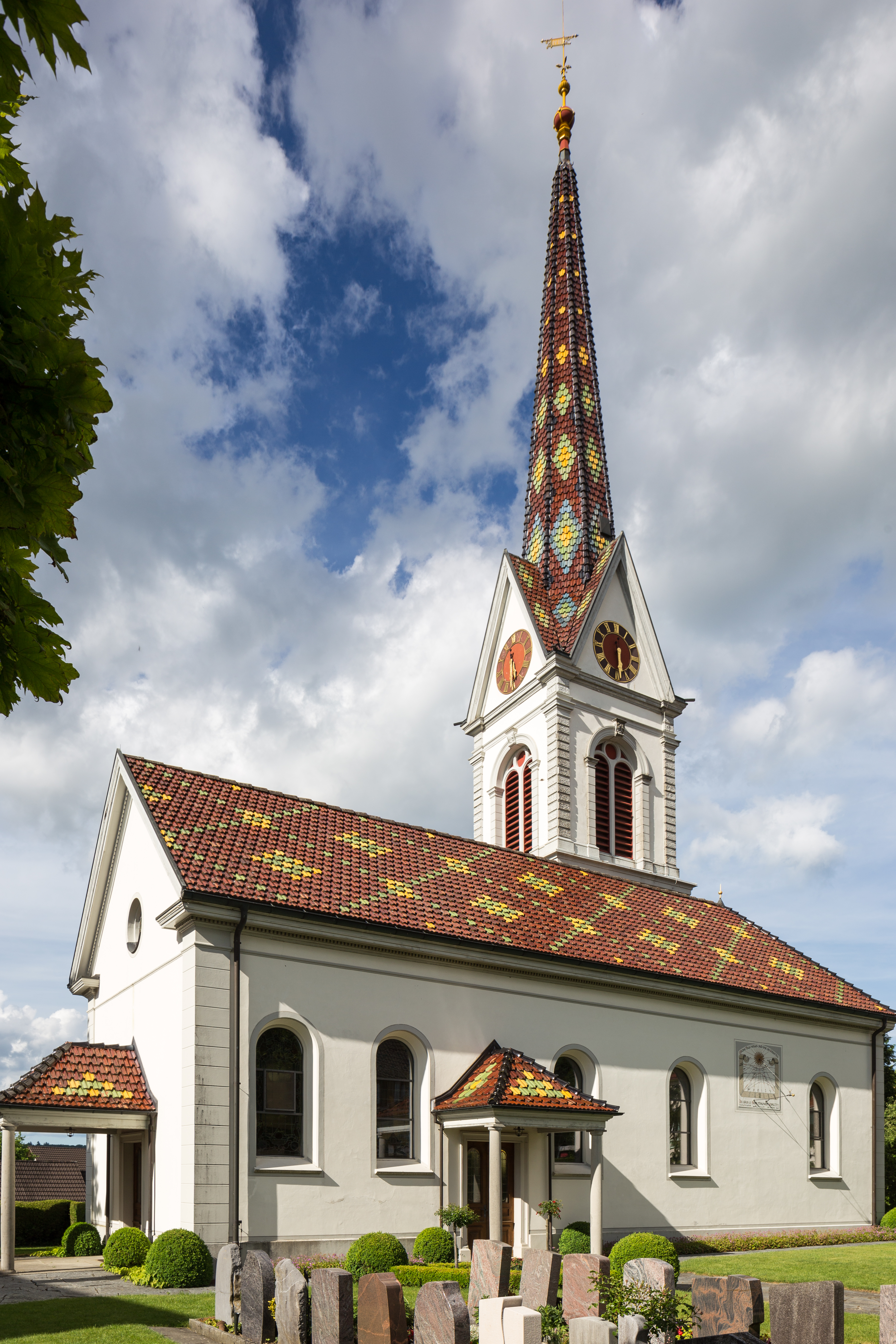 Evangelische Kirche Hugelshofen